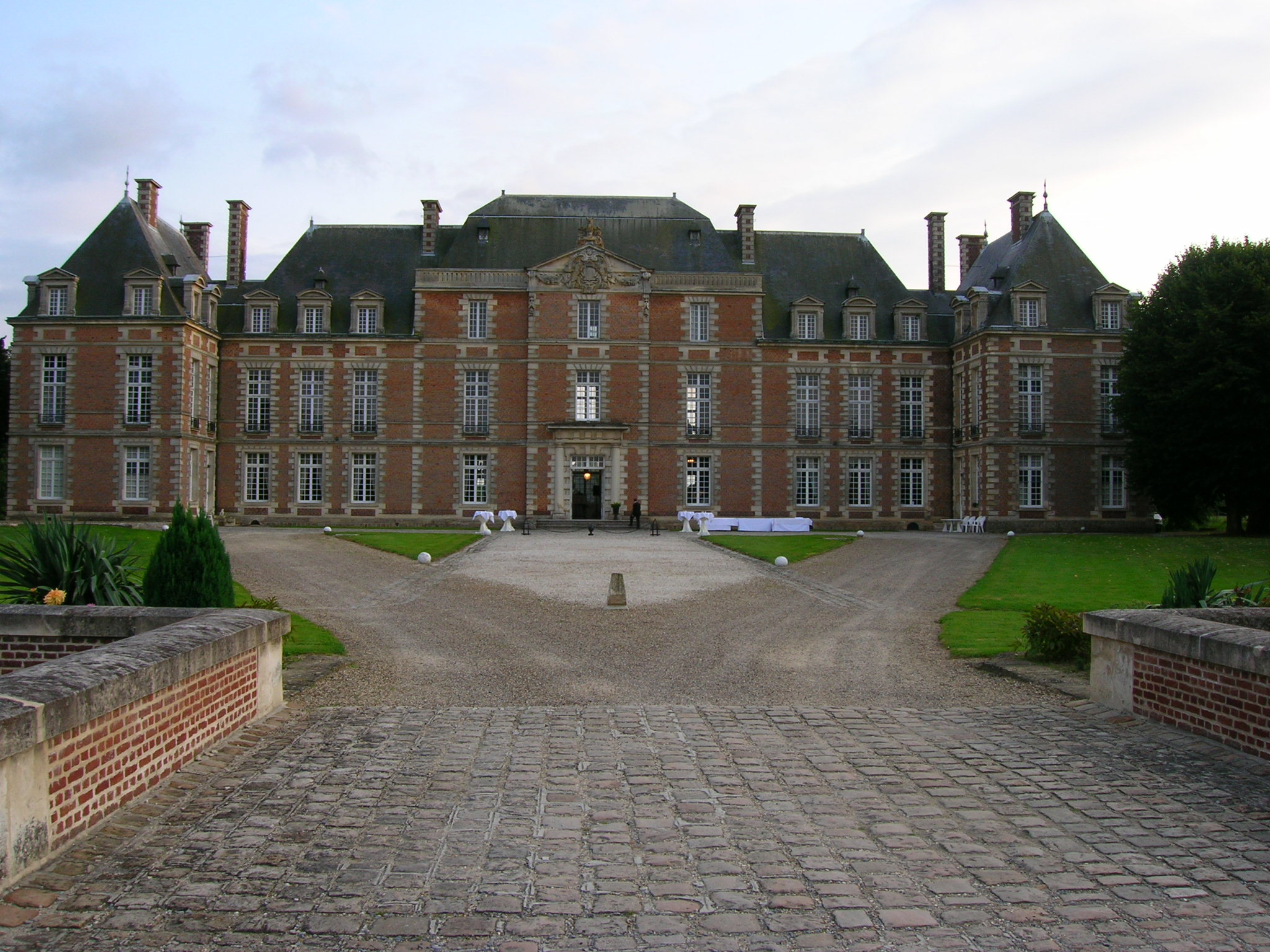 Château de Tilloloy dans la Somme